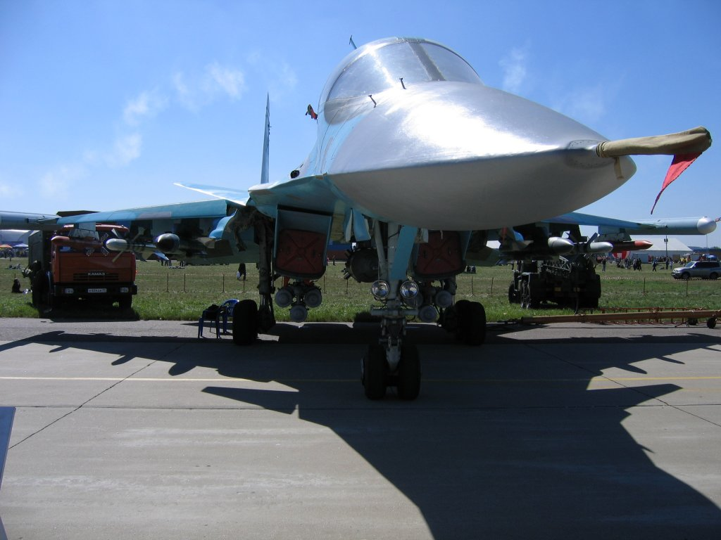 Su-34, Zhukovski, MAKS-2005